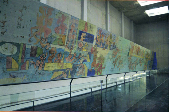 Imagen del mural realizado por Roberto Matta y la BRP (Brigada Ramona Parra) en la comuna de La Granja en 1971, ubicado al interior del Centro Cultural Espacio Matta comuna de La Granja, Santiago, Chile.